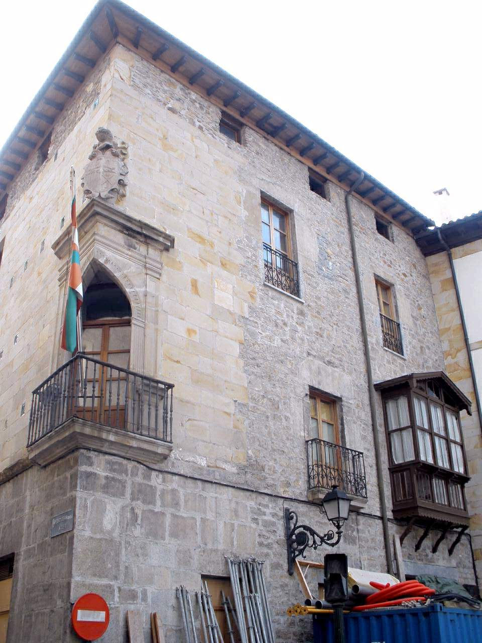 Casa Azkarate Marutegi, Bergara (Gipuzkoa)